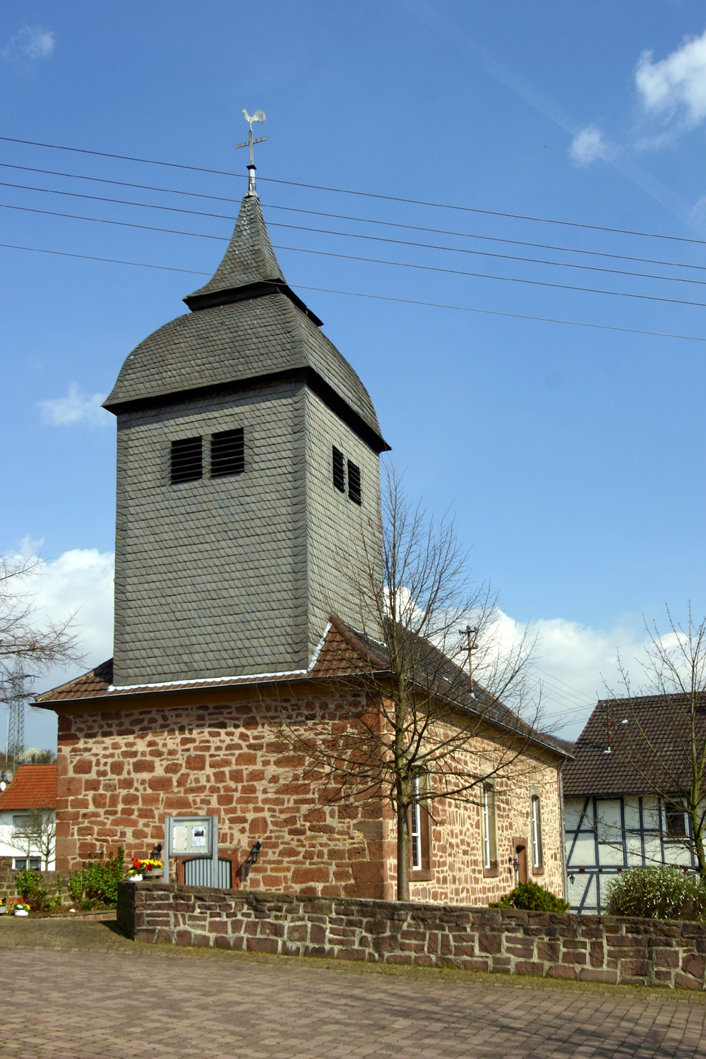 Kirche im Borkener Stadtteil Kerstenhausen